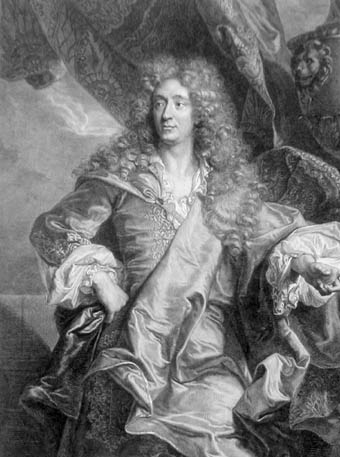 Portrait de Jean de Brunnenc